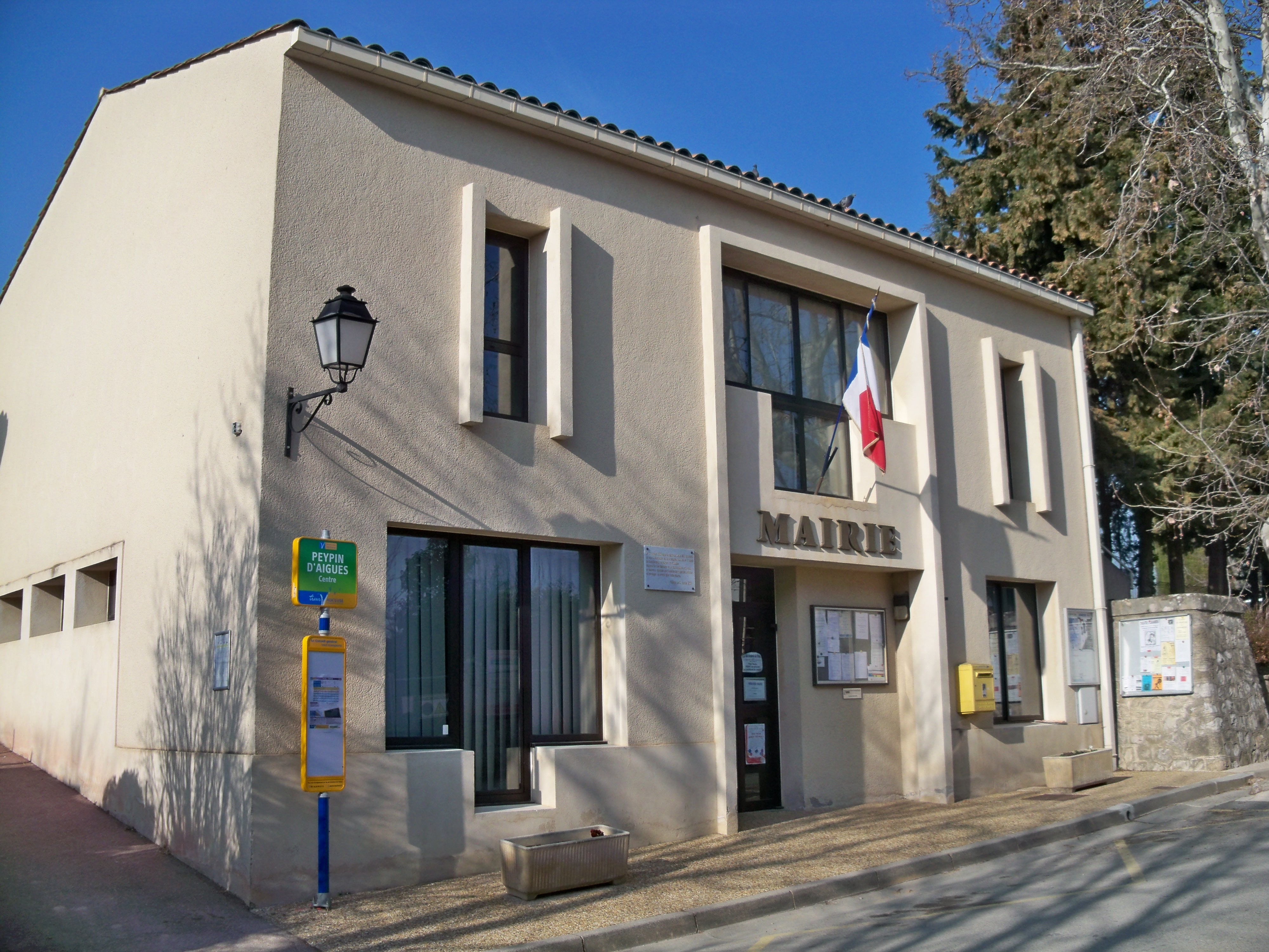 Mairie de Peypin d'Aigues, Vaucluse, France